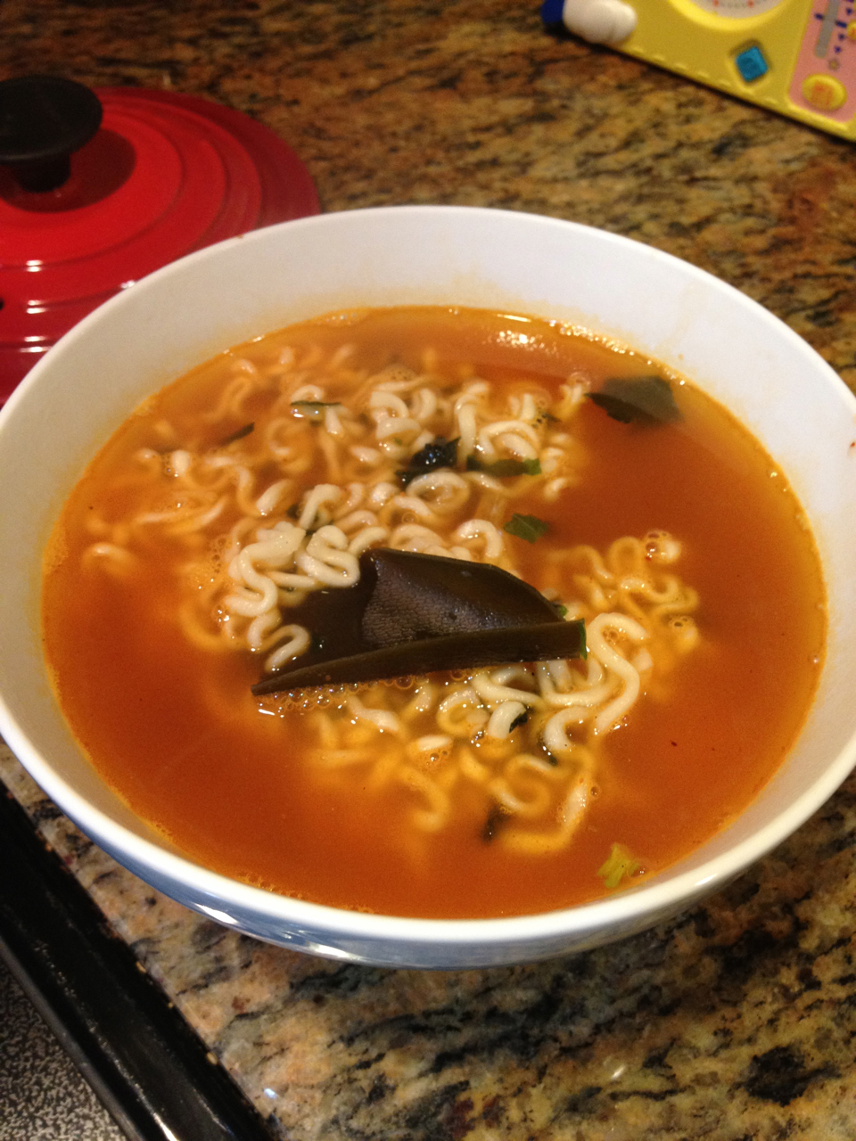 Neoguri Ramyeon 2